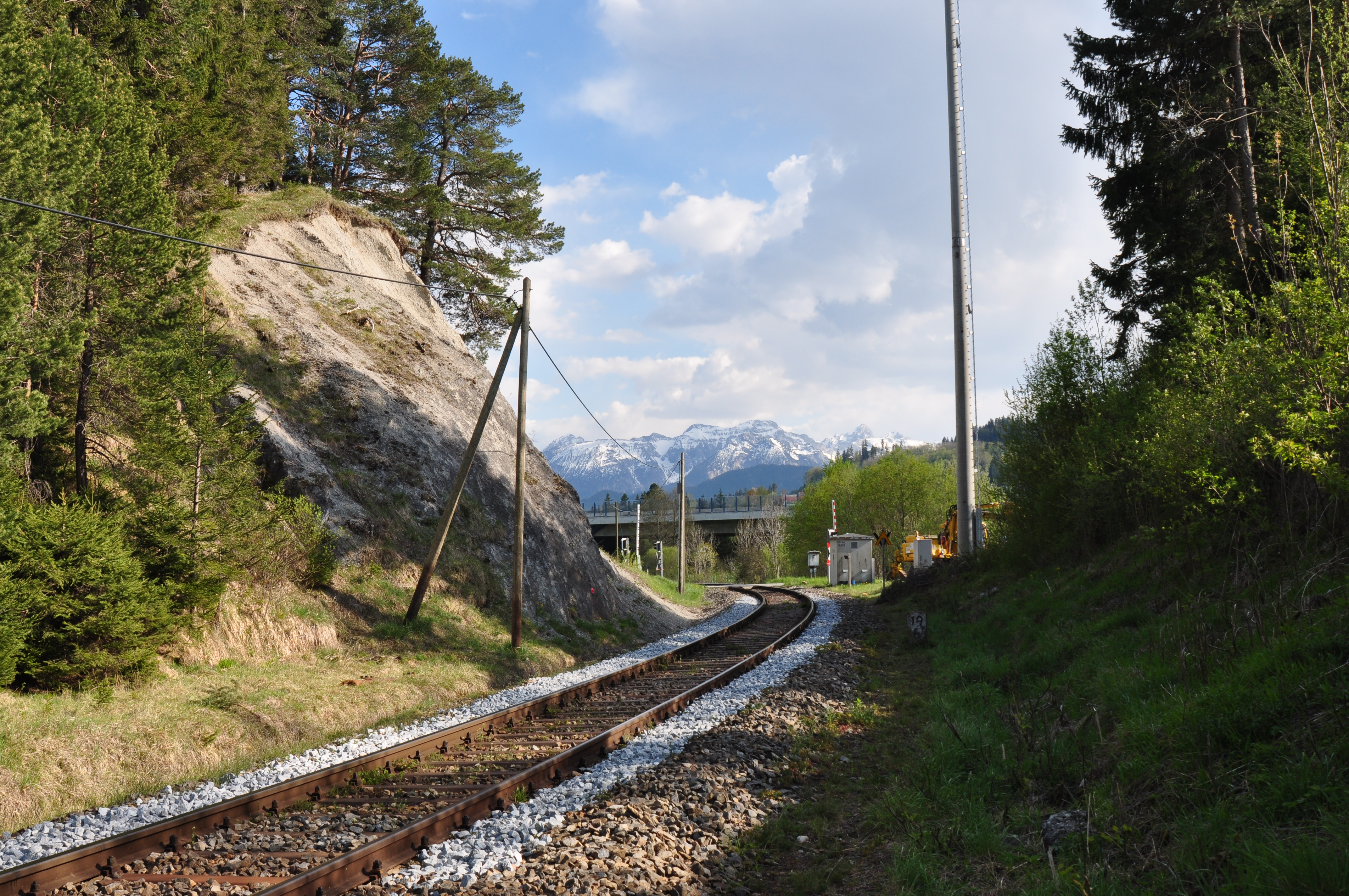 Bahneinschnitt bei Enzenstetten von Norden aus. Im Hintergrund sieht man die A7-Brücke und einen Teil der Allgäuer Alpen. Geotop 777A012